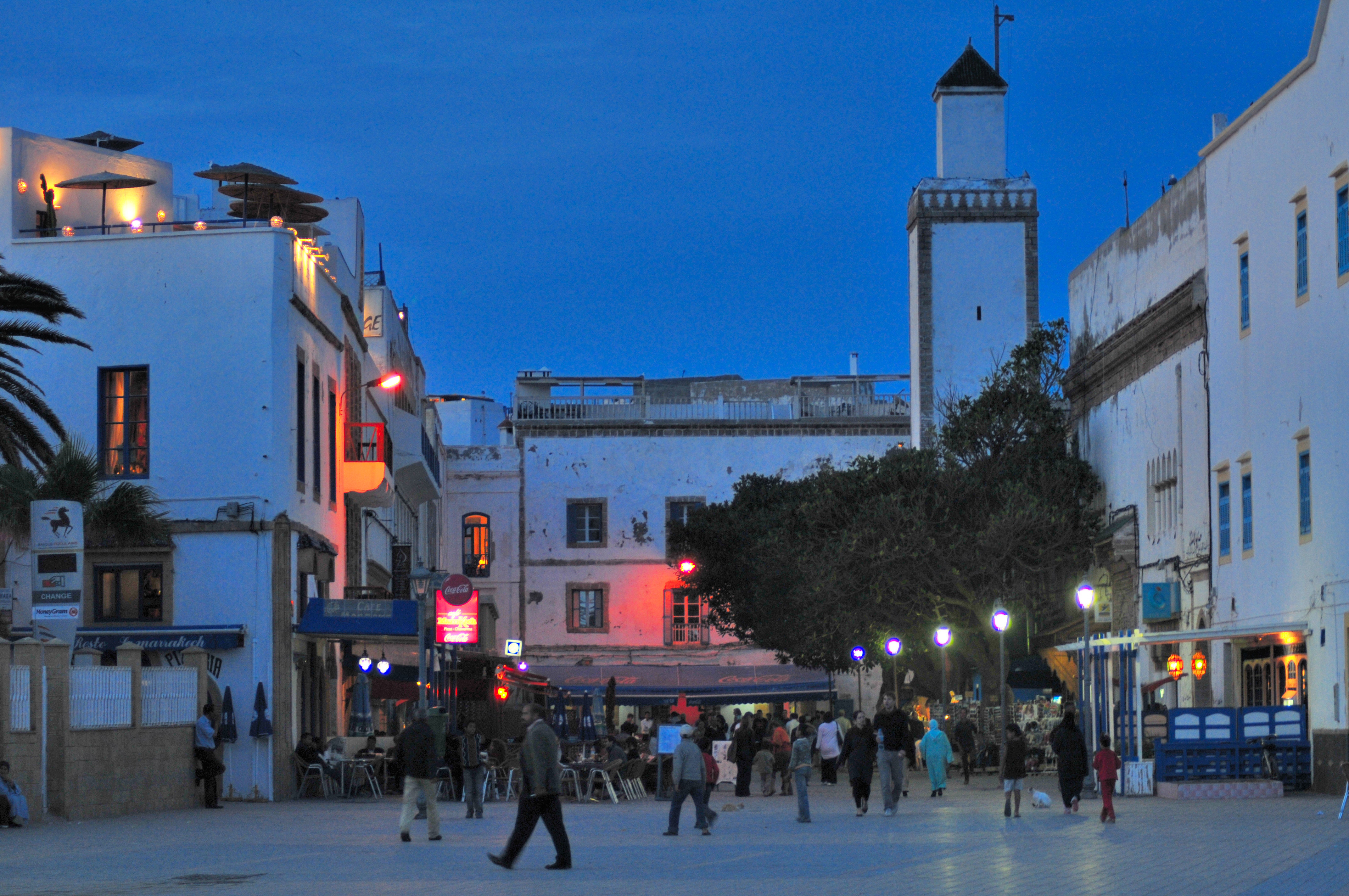 Esaoura_907.JPG maroc. Place Moulay Hassan